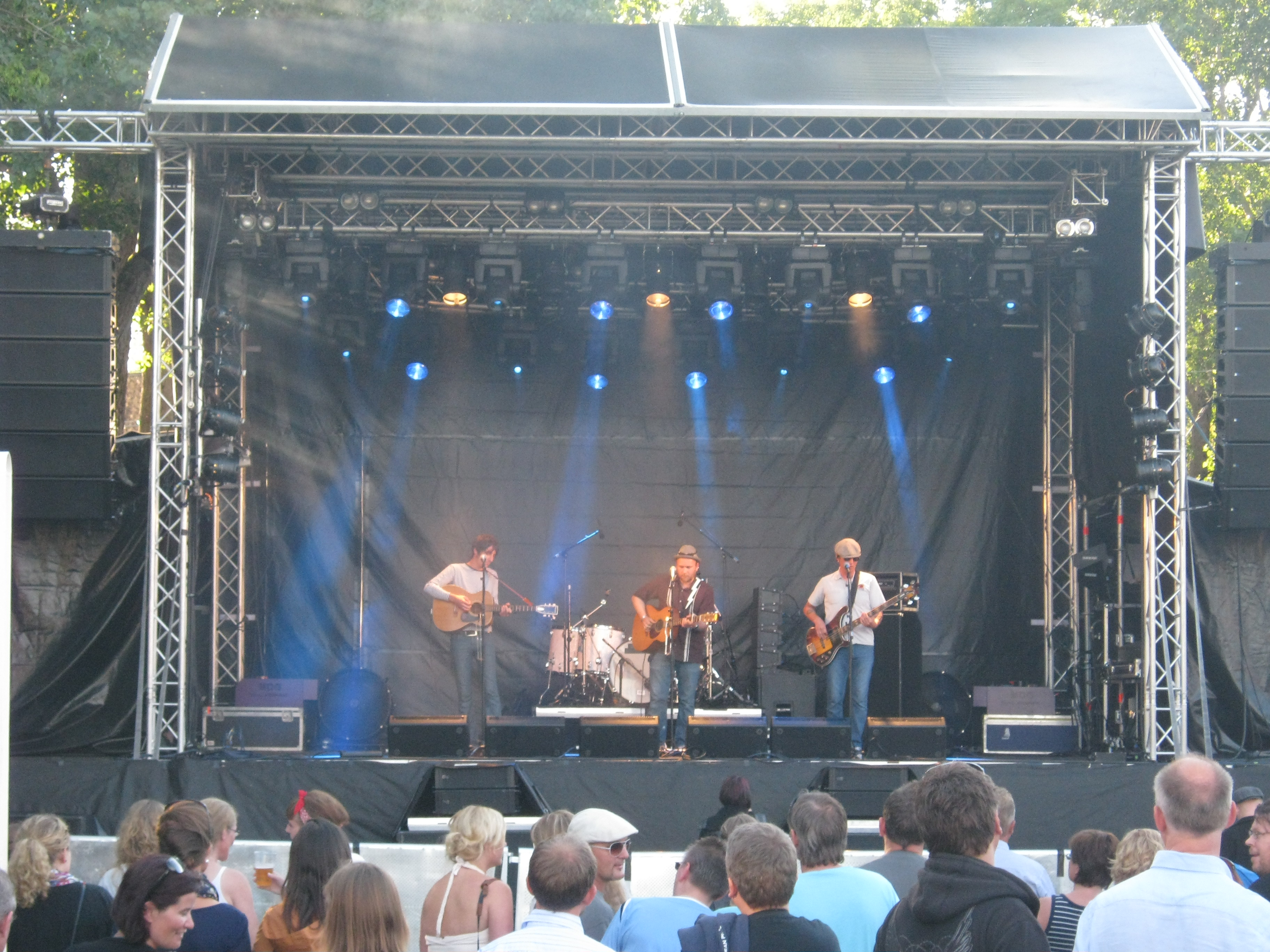 Frank Hammersland, Sgt Petter og Christer Knutsen under Periferifestivalen 2010.